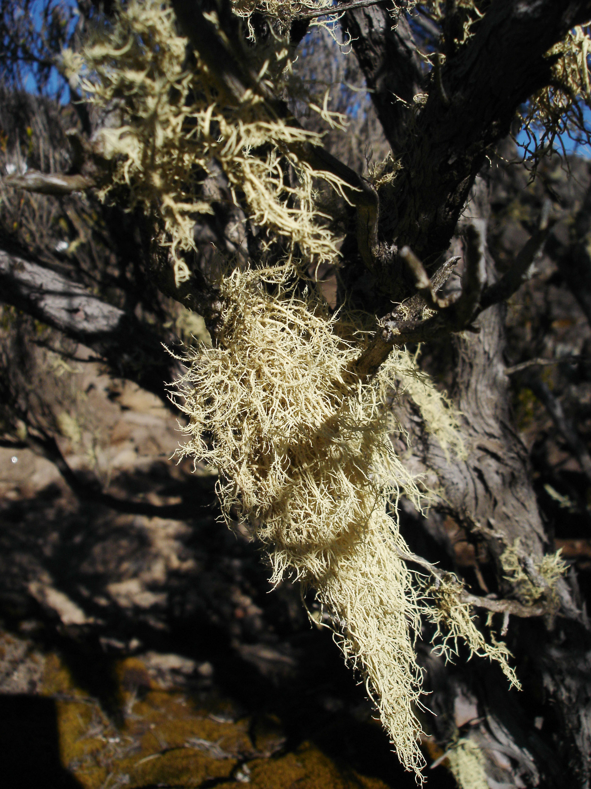 Description: Usnea barbata, "Barbe de Jupiter", november 2004, La Réunion Source: Bouba